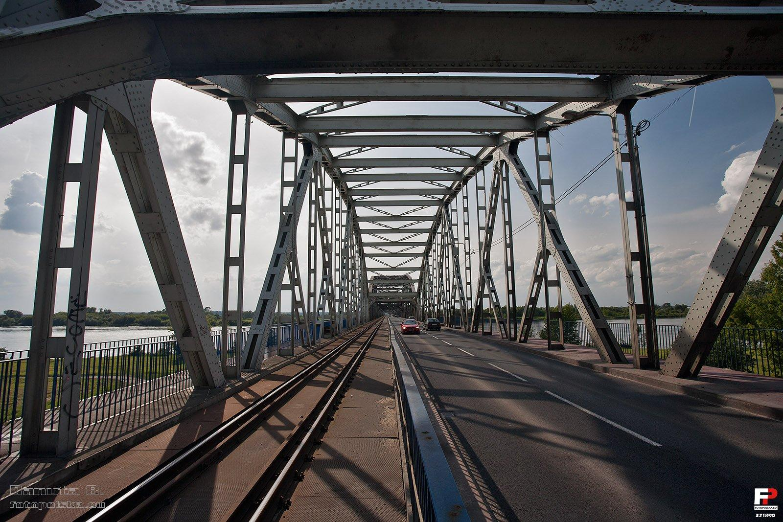 Najdłuższy w Polsce most drogowo - kolejowy. Wzniesiony w konstrukcji stalowej, kratownicowej, łączonej nitami, w latach 1876-79 przez Niemców. Z lewej jednotorowa linia kolejowa Działdowo - Chojnice.